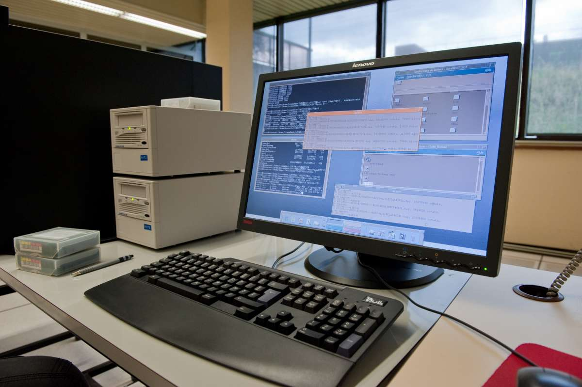 Cet ordinateur est l'un des outils de gestion du système Constance mis en place aux Archives nationales (France) pour garantir la pérennité des archives électroniques produites par l'Etat.